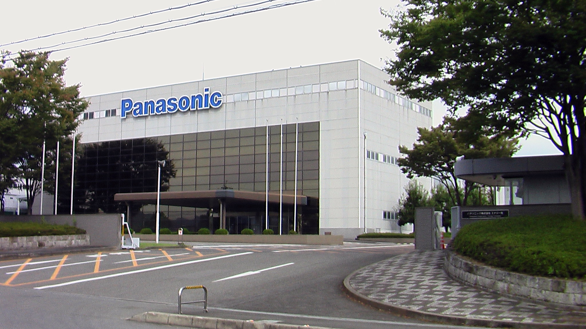 投稿者自身が『パナソニック株式会社 エナジー社和歌山工場』（和歌山県紀の川市打田612-1）を撮影。